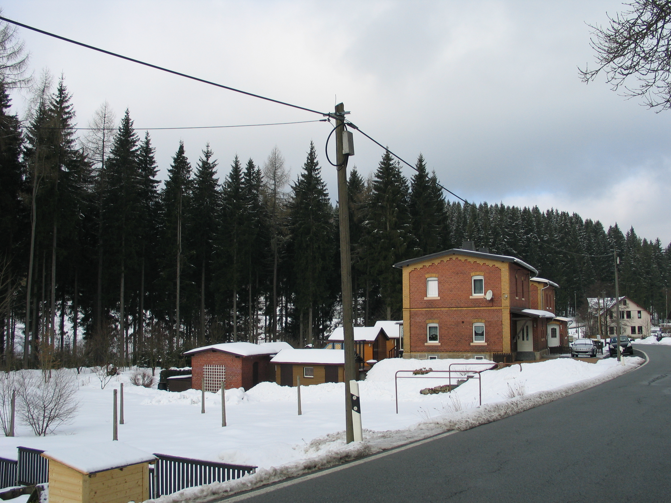 Wohnhaus mit ehemaligem Waschhaus einer Kleinsiedlung; Typenbauten einer Bahnsiedlung mit orts- und verkehrsgeschichtlicher Bedeutung.